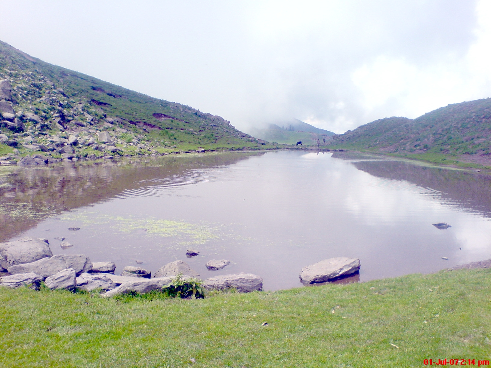 Sar-Kanshian